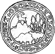 Pečeť obce Velké Karlovice